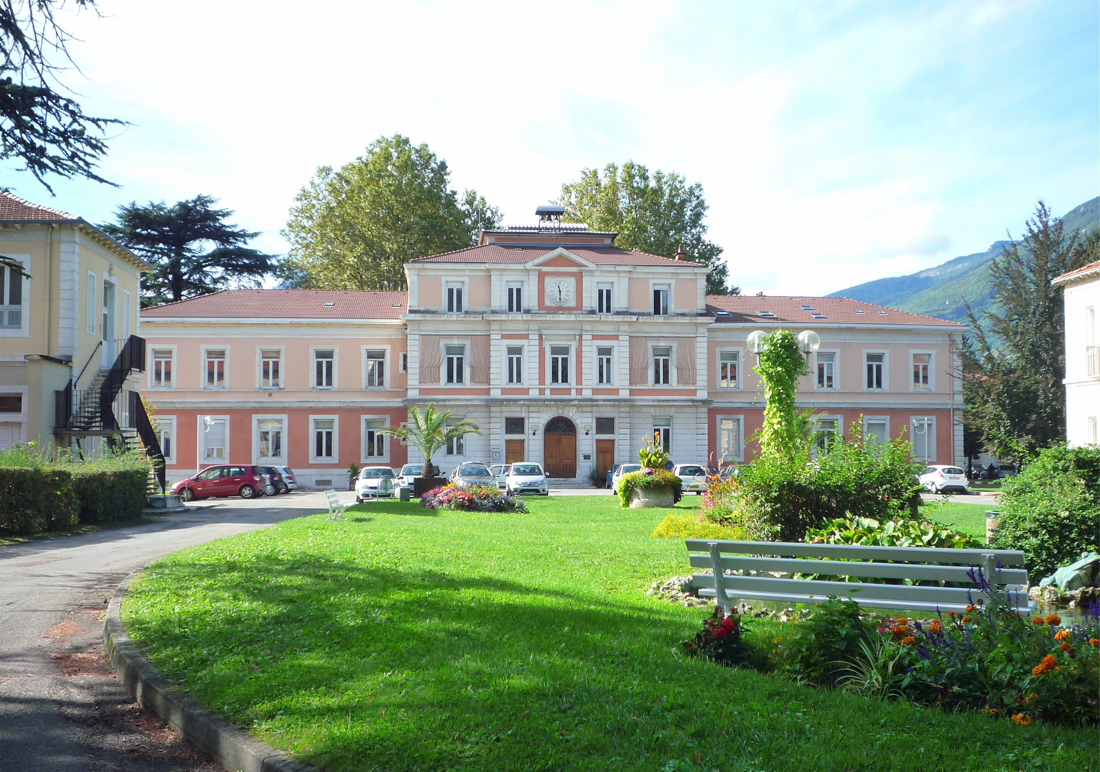 Hôpital psychiatrique Alpes-Isère, rue de la gare à Saint-Egrève (38)